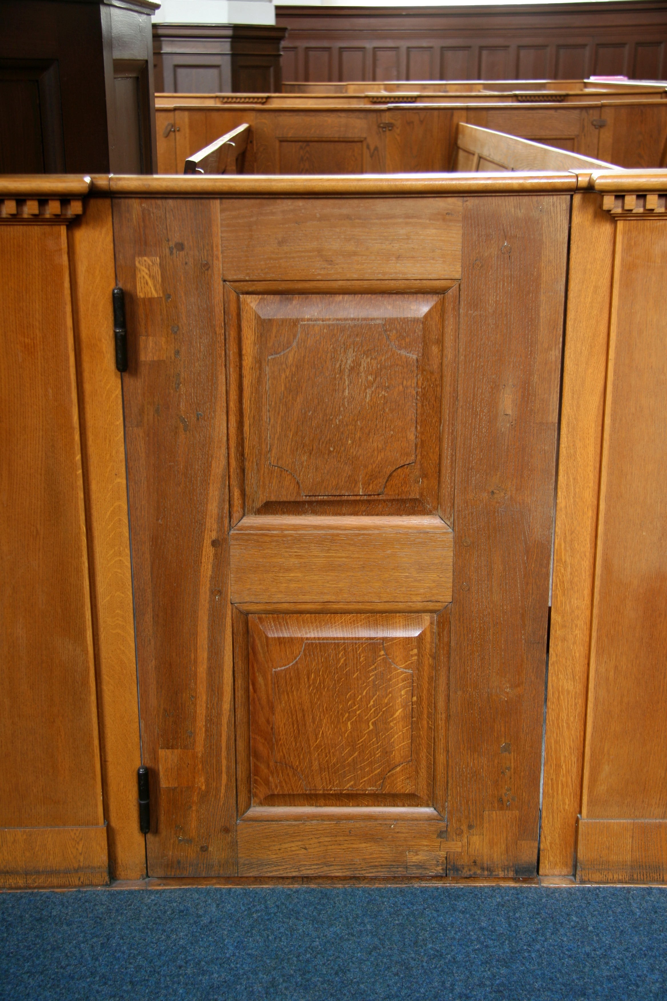 Helligåndskirken, Copenhagen, Denmark. Re-used door from older benches.